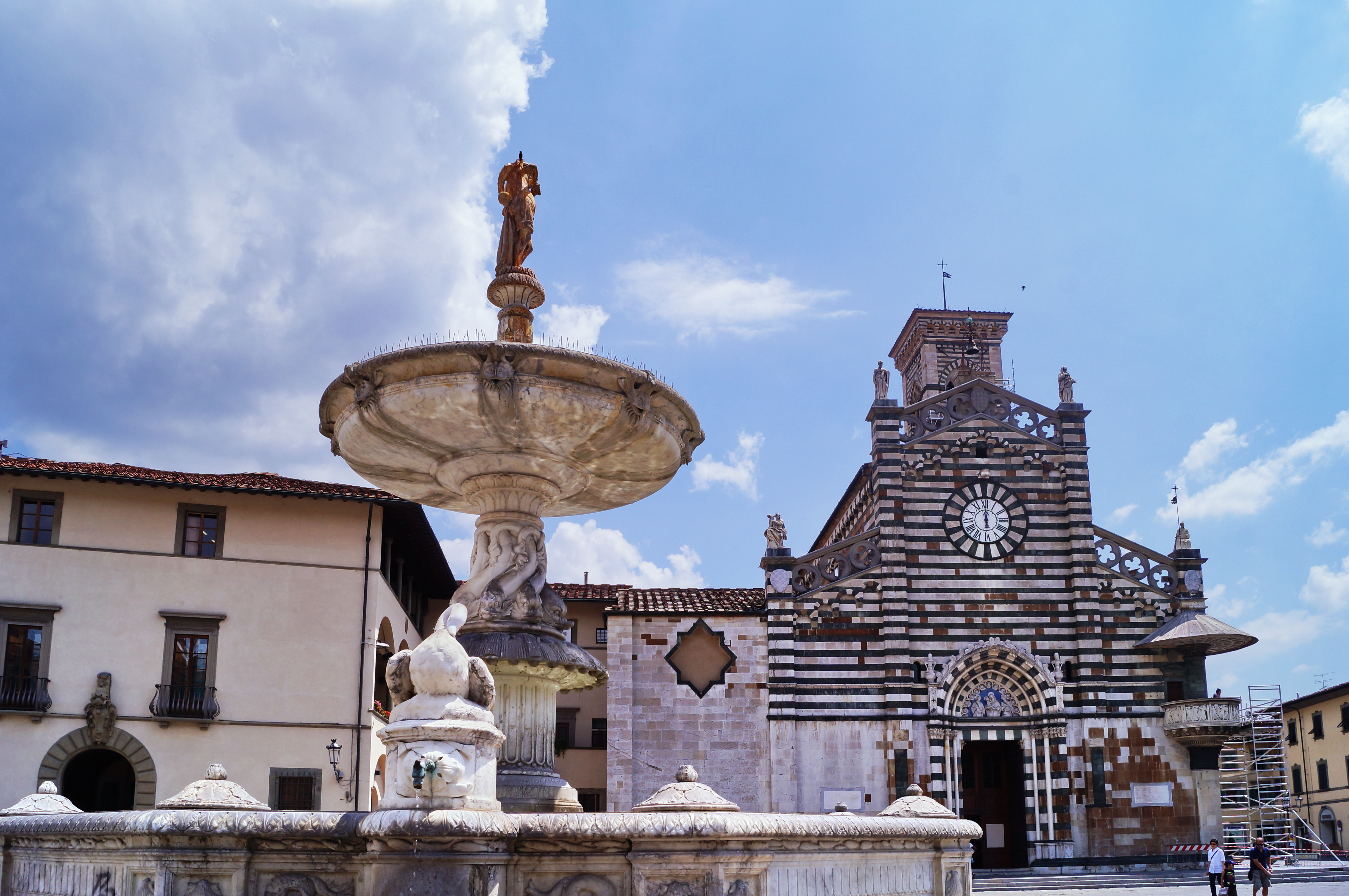 Piazza del Duomo di Prato, Toscana, Italia This is a photo of a monument which is part of cultural heritage of Italy.